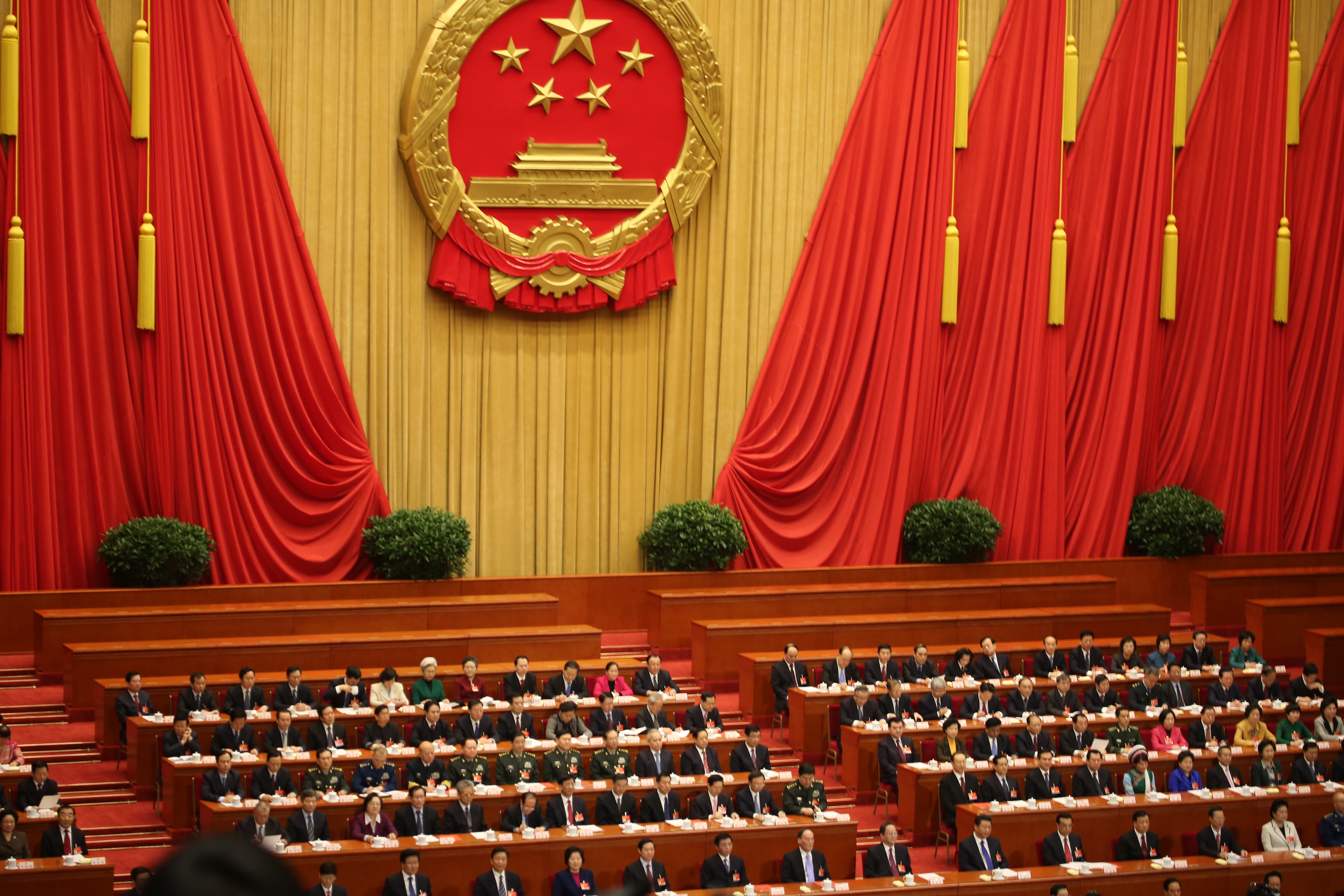 中华人民共和国第十二届全国人民代表大会第三次会议在北京闭幕，图为闭幕式现场。